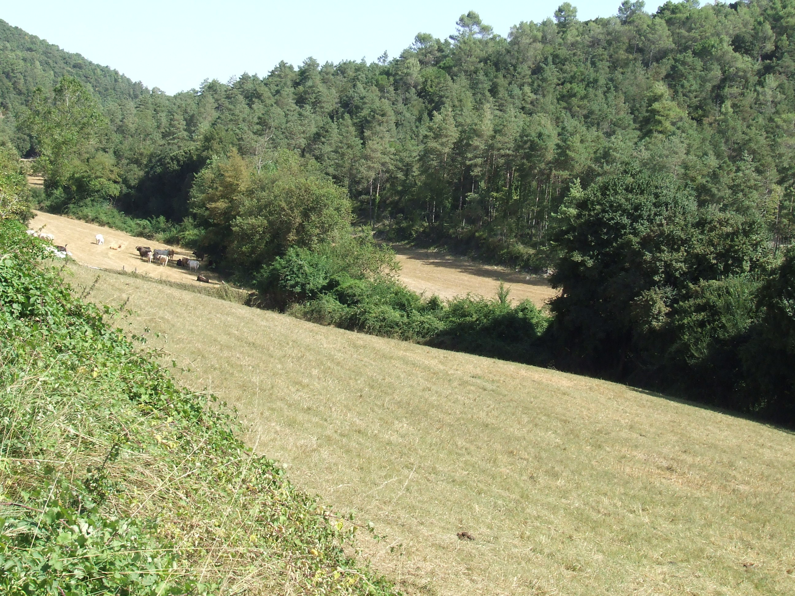 Quintana de Cal Fantasia (Castellcir, Moianès)